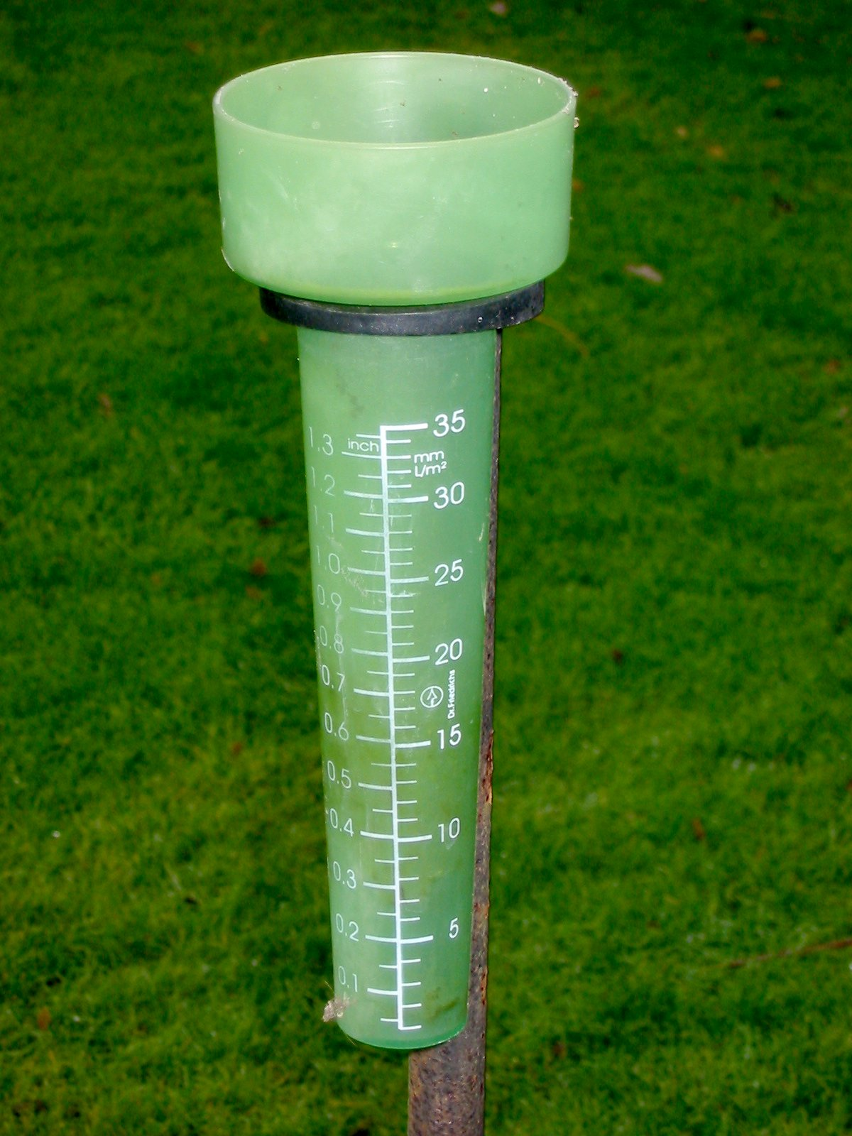 Einfacher Regenmesser für den Hausgebrauch